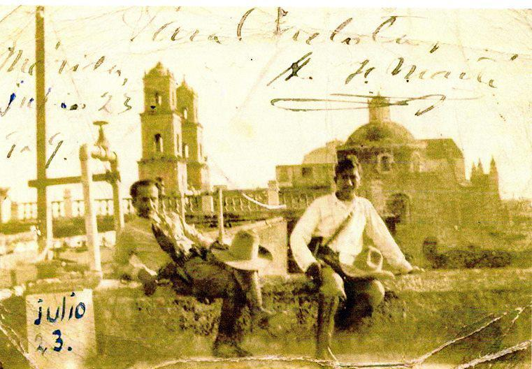 Farabundo Marti (izquierda) y Augusto Sandino (derecha) en Mexico 1929